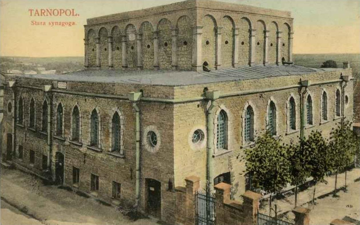 Старая синагога в Тернополе.